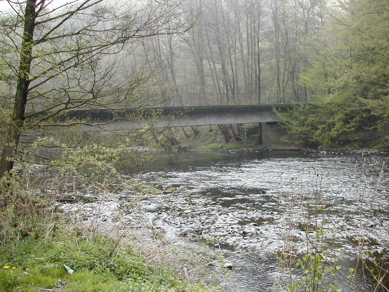 Theodor-Schröder-Weg über die Wupper